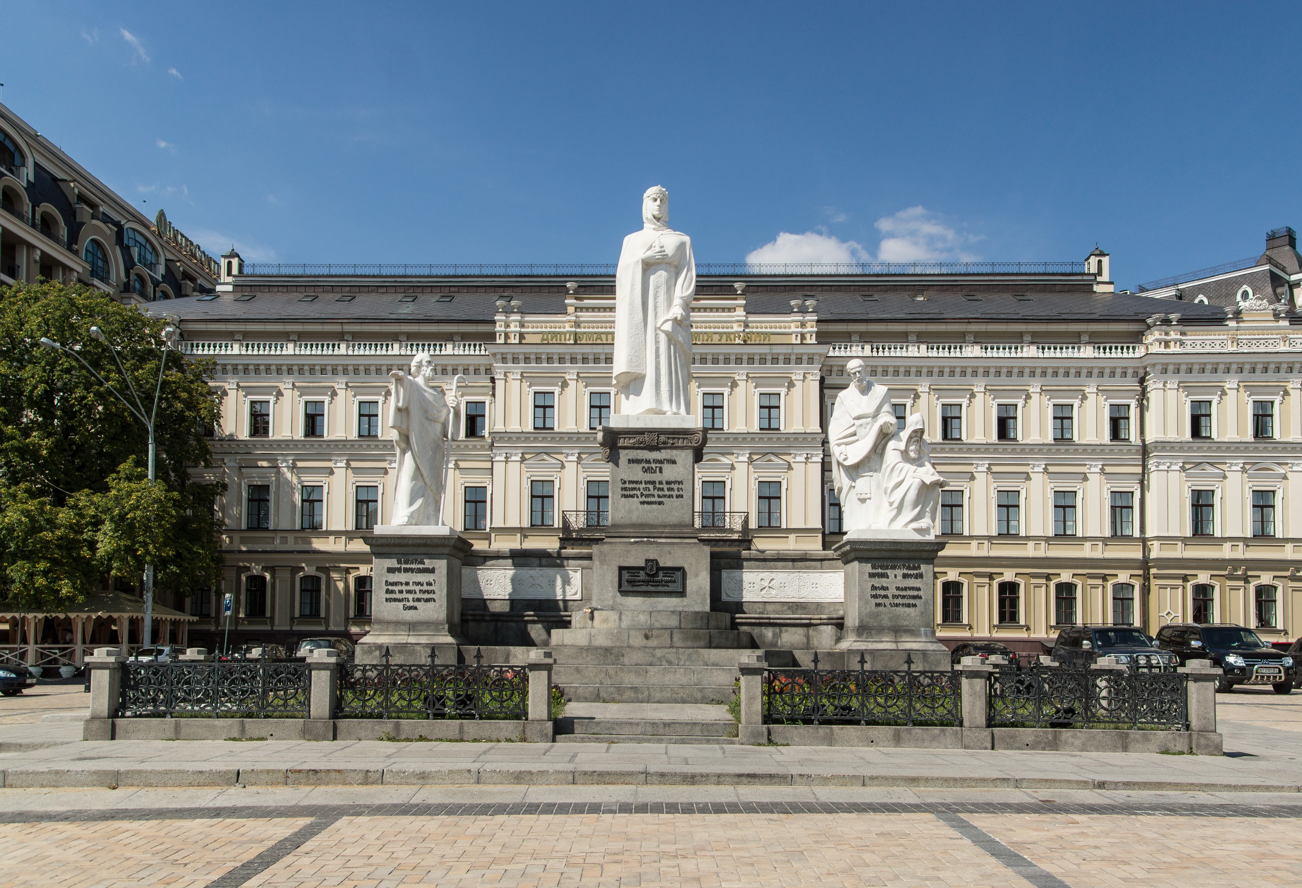 Monumento a la Princesa Olga